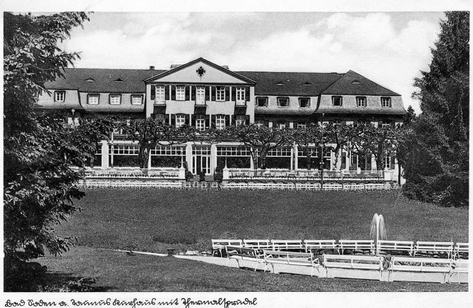 Alte Ansichtskarte vom Kurhaus Bad Soden 1936